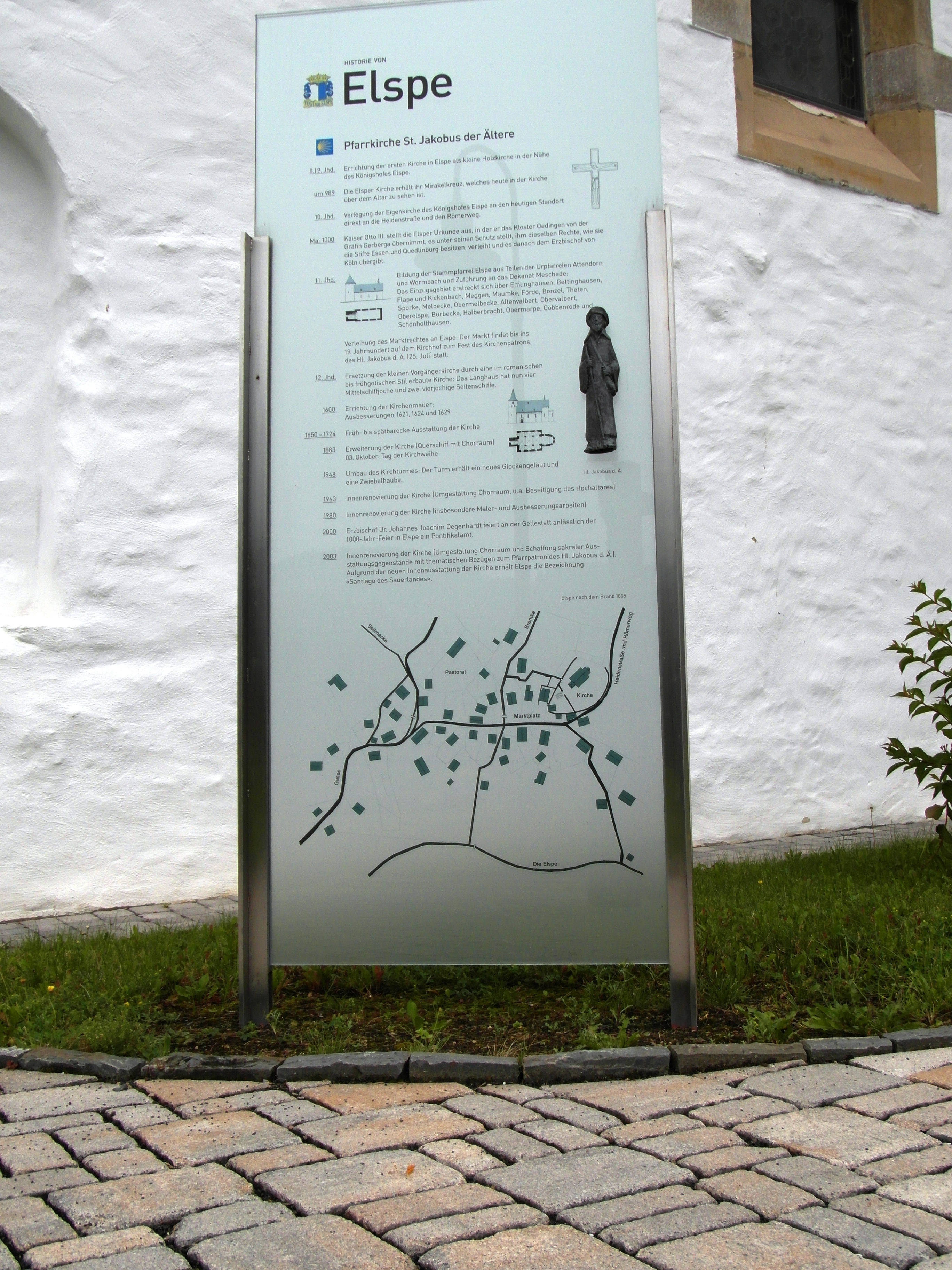 Informationstafel St. Jakobus d.Ä. und Ort Elspe